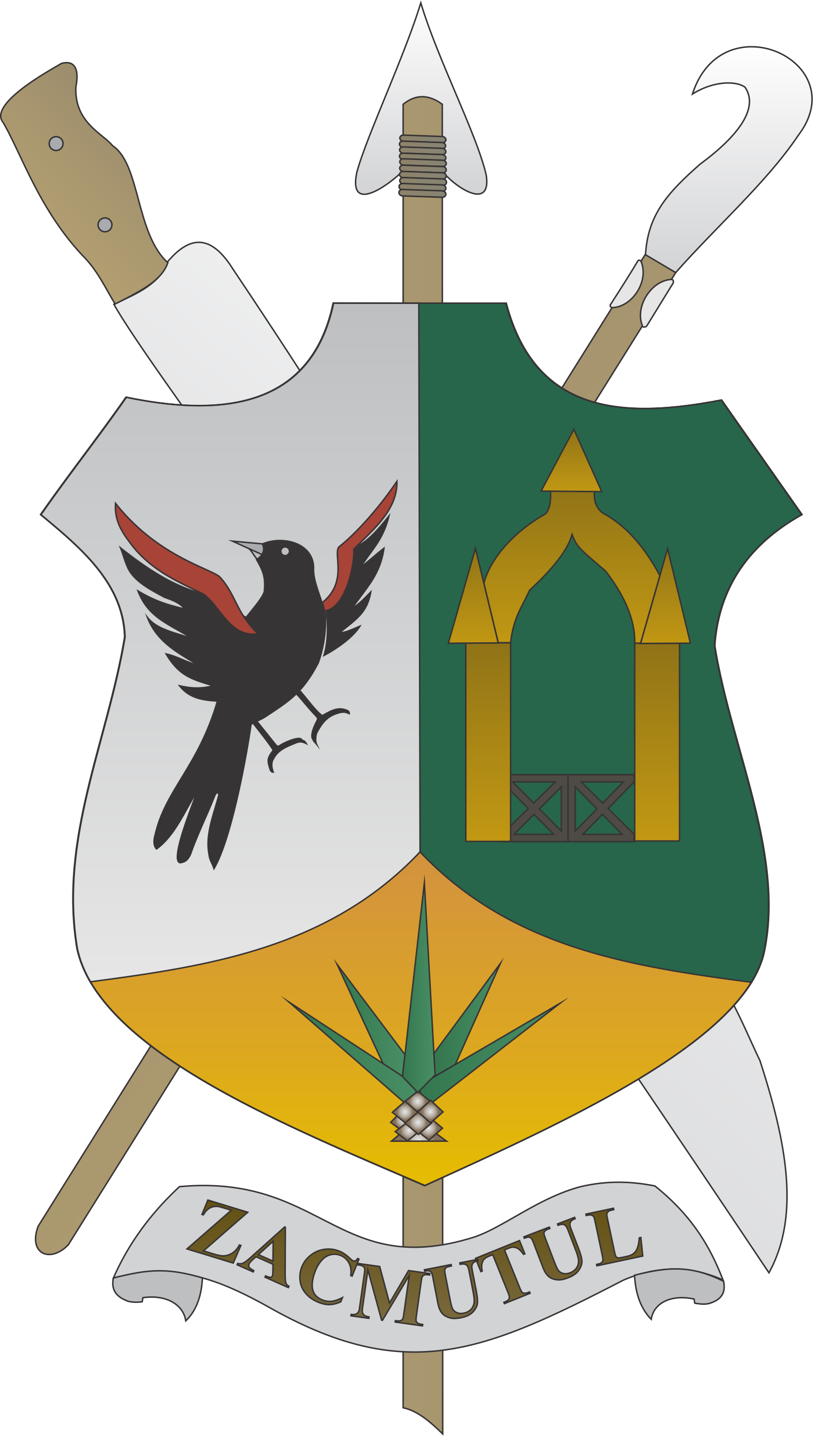 Escudo municipal de Motul (Yucatán):“Escudo partido y entado en punta” (esto es, dividido verticalmente en dos cuarteles iguales que se bifurcan curvilineamente en la punta, dejando espacio para otro cuartel mas pequeño). El primer cuartel (izquierda) lleva un campo de plata, un pájaro de “sable” (negro) cuyas alas abiertas tienen las puntas extremas marcadas de “gules” (rojo). El segundo cuartel (derecha) ostenta un marco colonial yucateco de oro, sobre campo de sinople (verde) en el cuartel inferior (“entado en punto”) destacada una planta de henequén en su color natural sobre campo de oro. Como elementos exteriores el escudo de Motul lleva “acolados en aspa” (tras el escudo y cruzados) un machete y cuyos extremos sobresalen a ambos lados del blasón. Tras el escudo y en posición vertical central asoman igualmente los extremos de una lanza indígena antigua. Bajo el escudo exteriormente una cintilla de plata lleva inscrita la palabra: ZAC MUTUL.